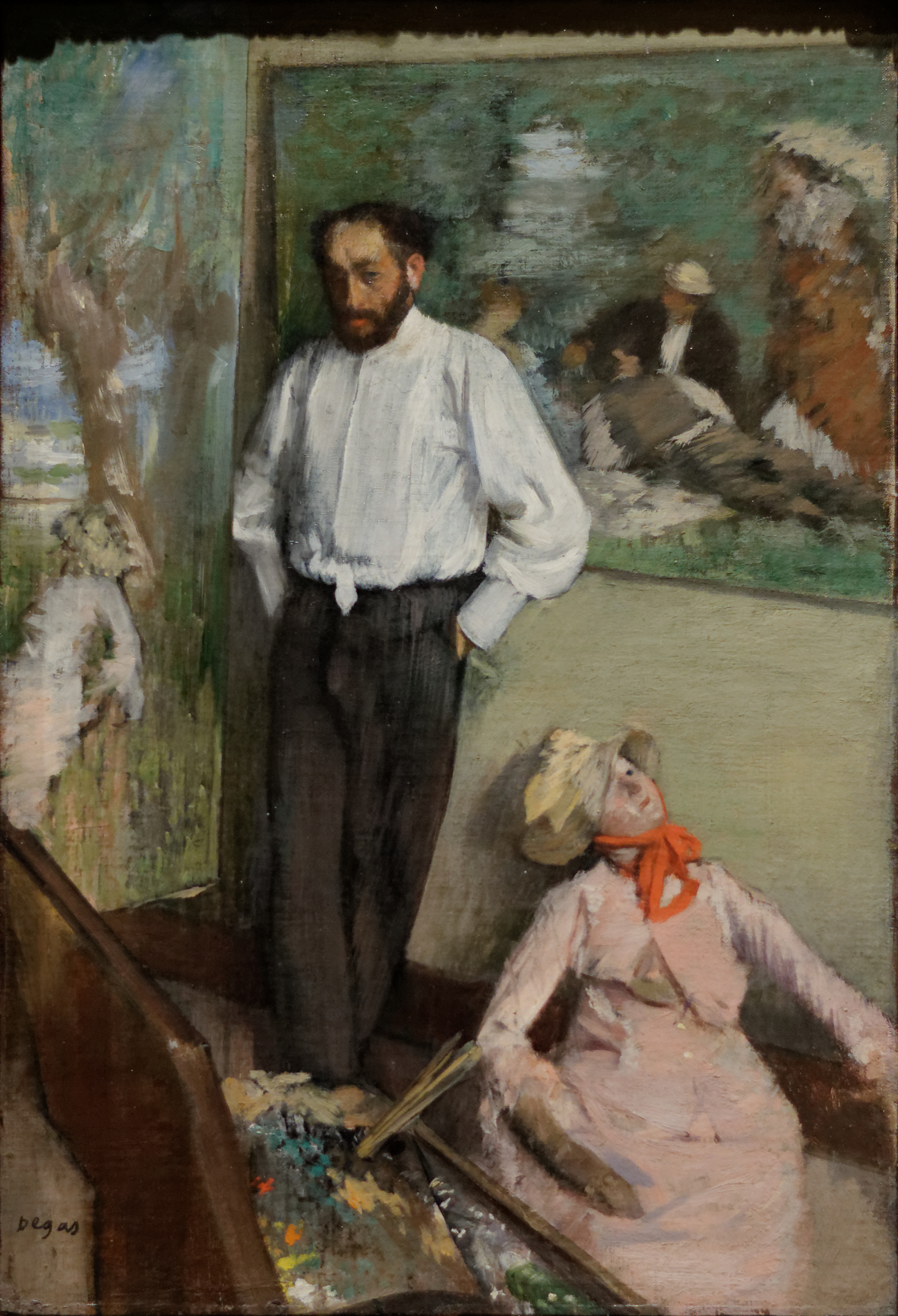 Portrait de Henri Michel-Lévy par Edgar Degas. Huile sur toile (1878) exposée au musée Calouste Gulbenkian, Lisbonne.